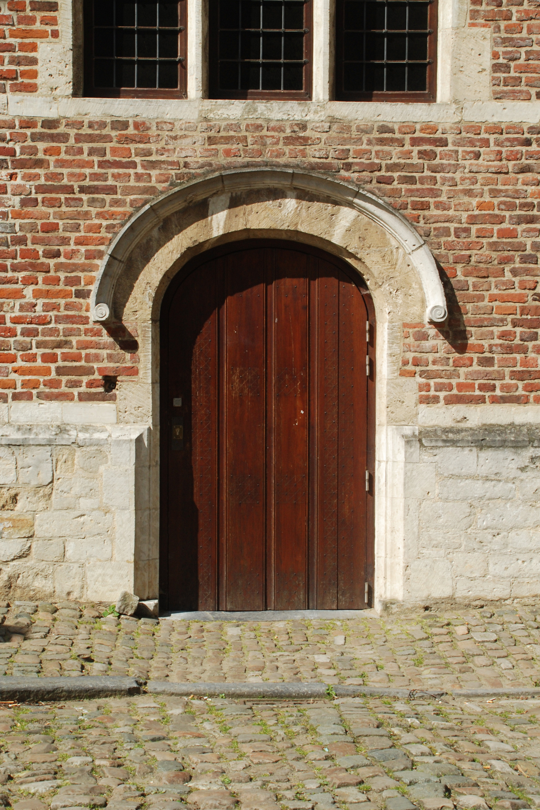 Belgium - Leuven - Groot Begijnhof - Heilige Geesttafel - Middenstraat n° 16